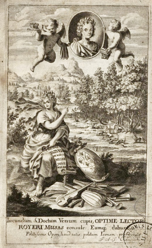 Carl Desiderius de Royer, Titelblatt seines Epigrammwerkes Musarum juvenilium mit Portrait Front Cover with portrait of Carolus Desiderius Royerus (1650-1707)